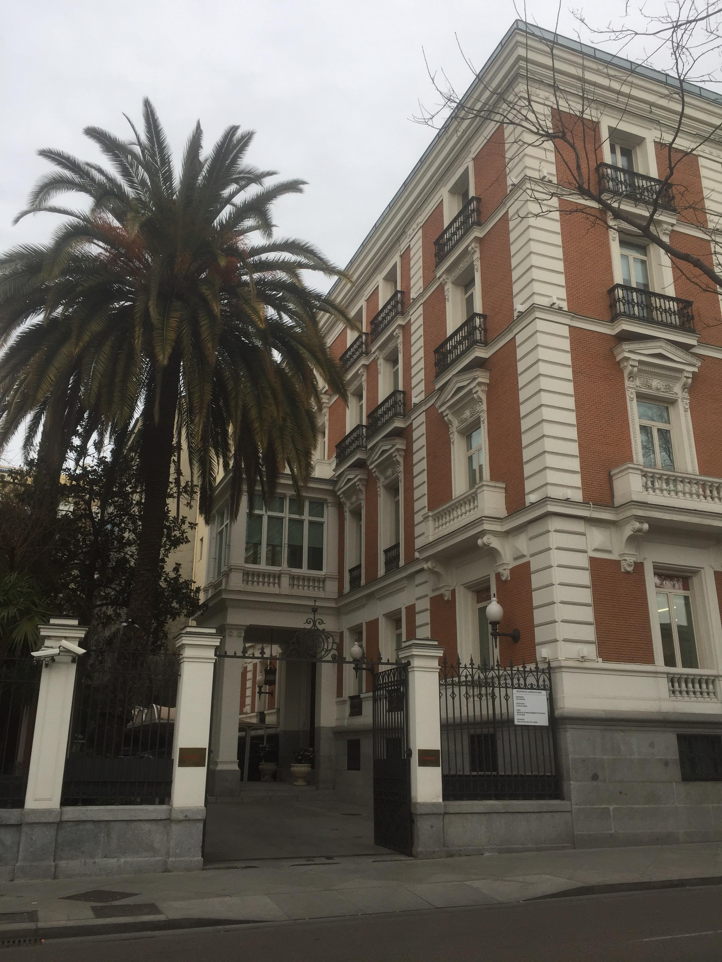 Fachada sureste del antiguo palacio del duque de Elduayen en Madrid (España).